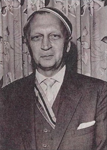 Porträtfotografie von Kurt Tornier